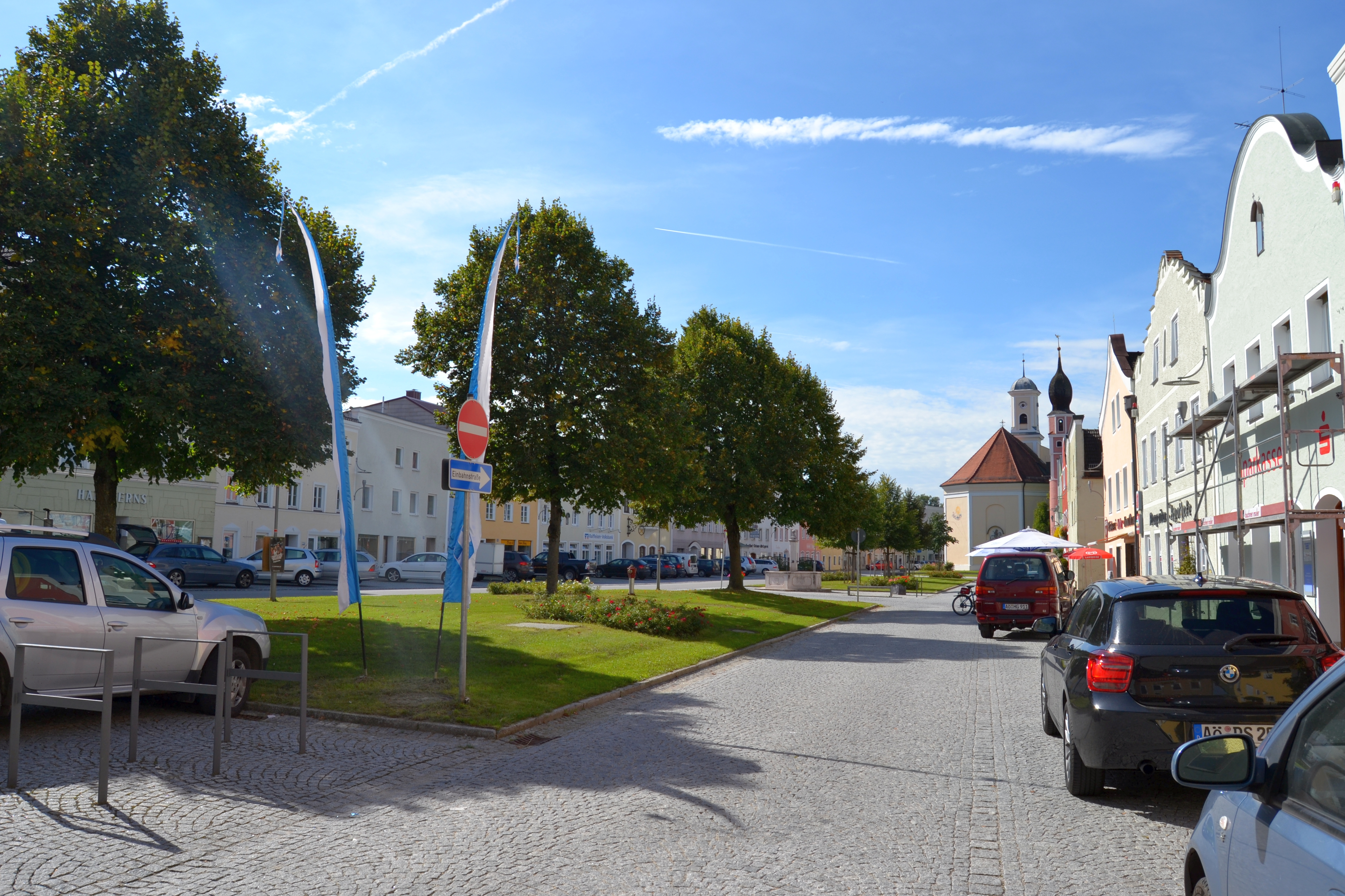 Denkmalgeschütztes Ensemble Marktplatz TüßlingThis is a photograph of an architectural monument.